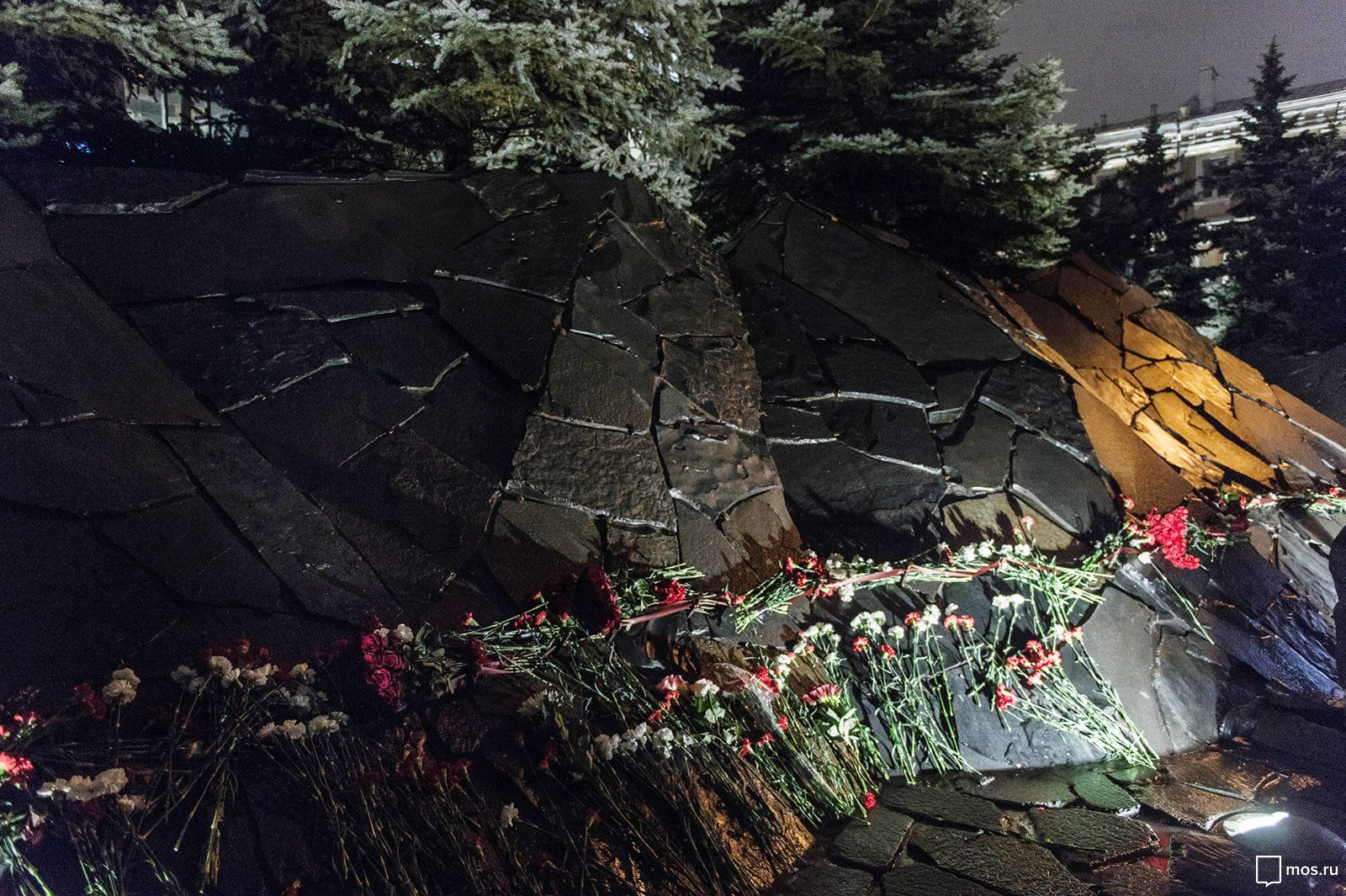 Открытие мемориала «Стена скорби»